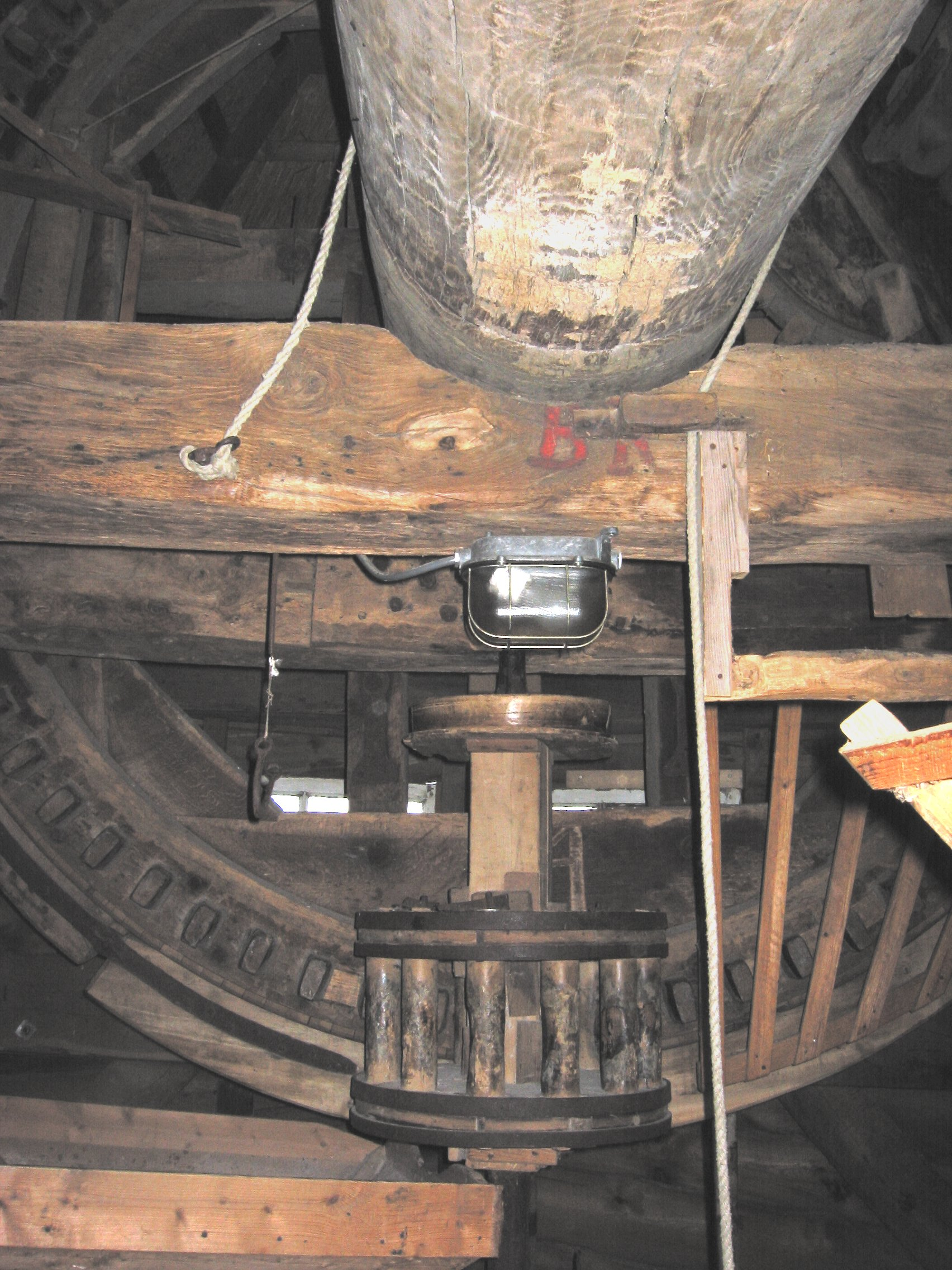 Doesburger molen aandrijfwerk 2e maalstoel, Ede, Nederland